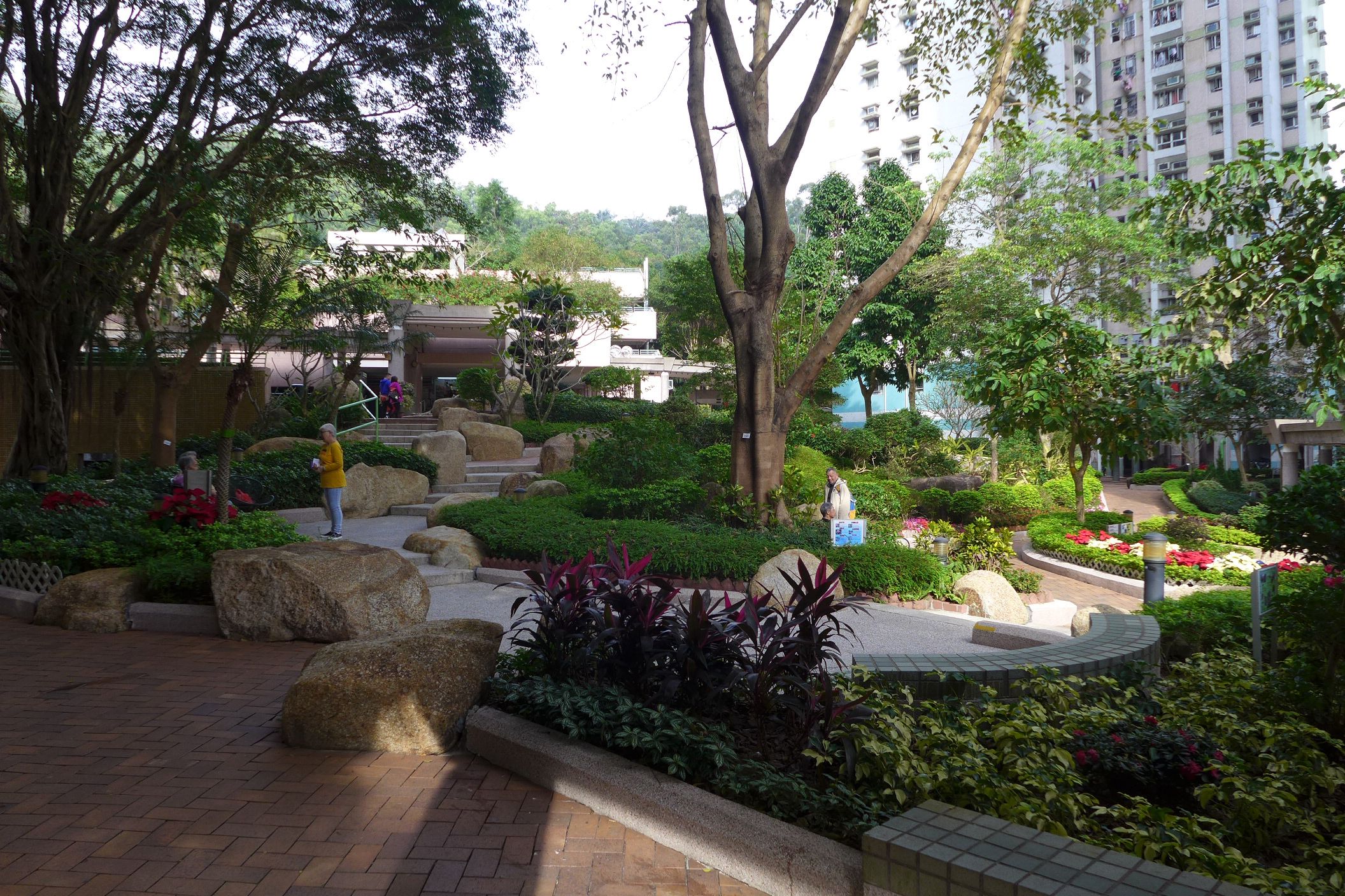 Mei Chung Court Landscape Area